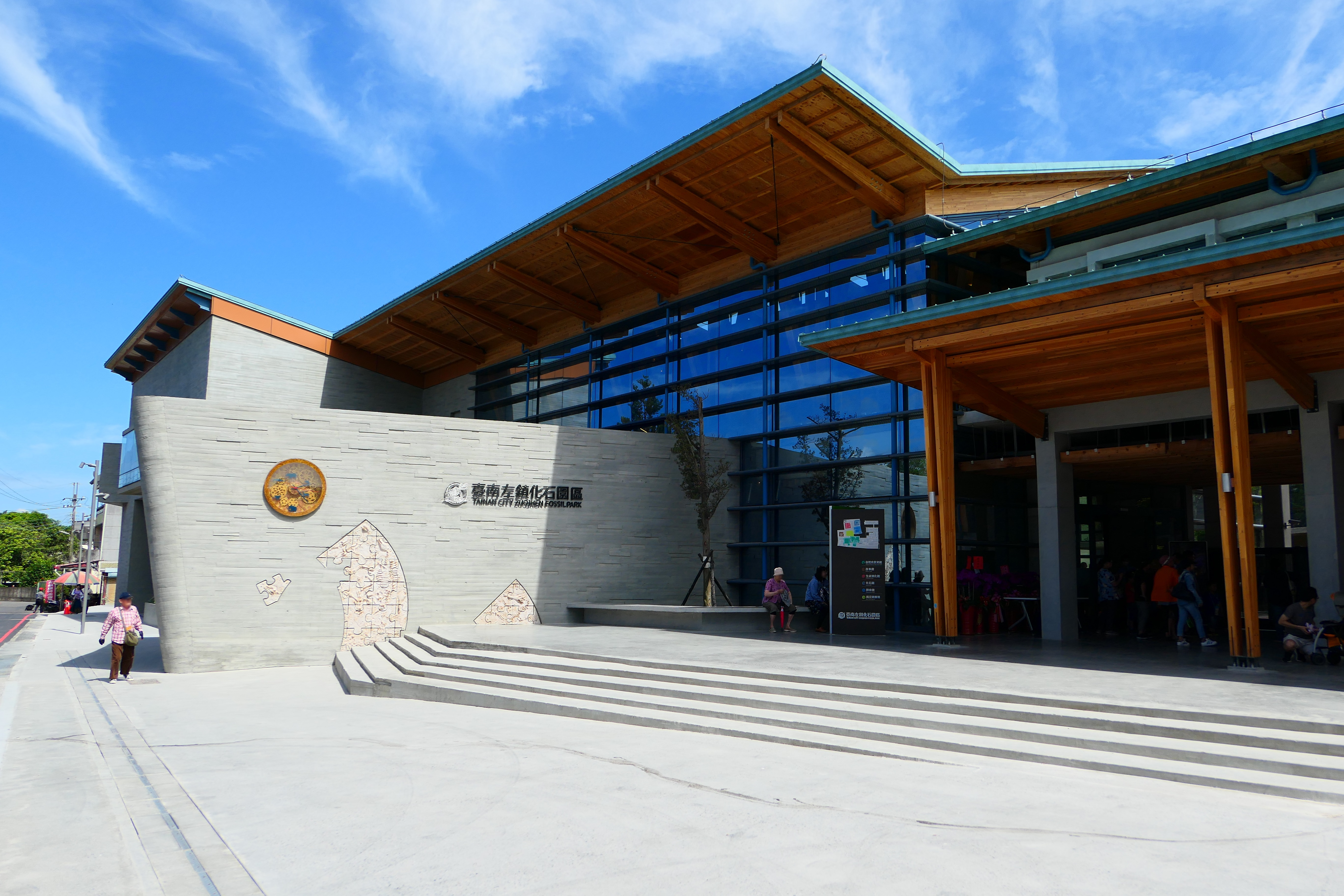 臺南左鎮化石園區